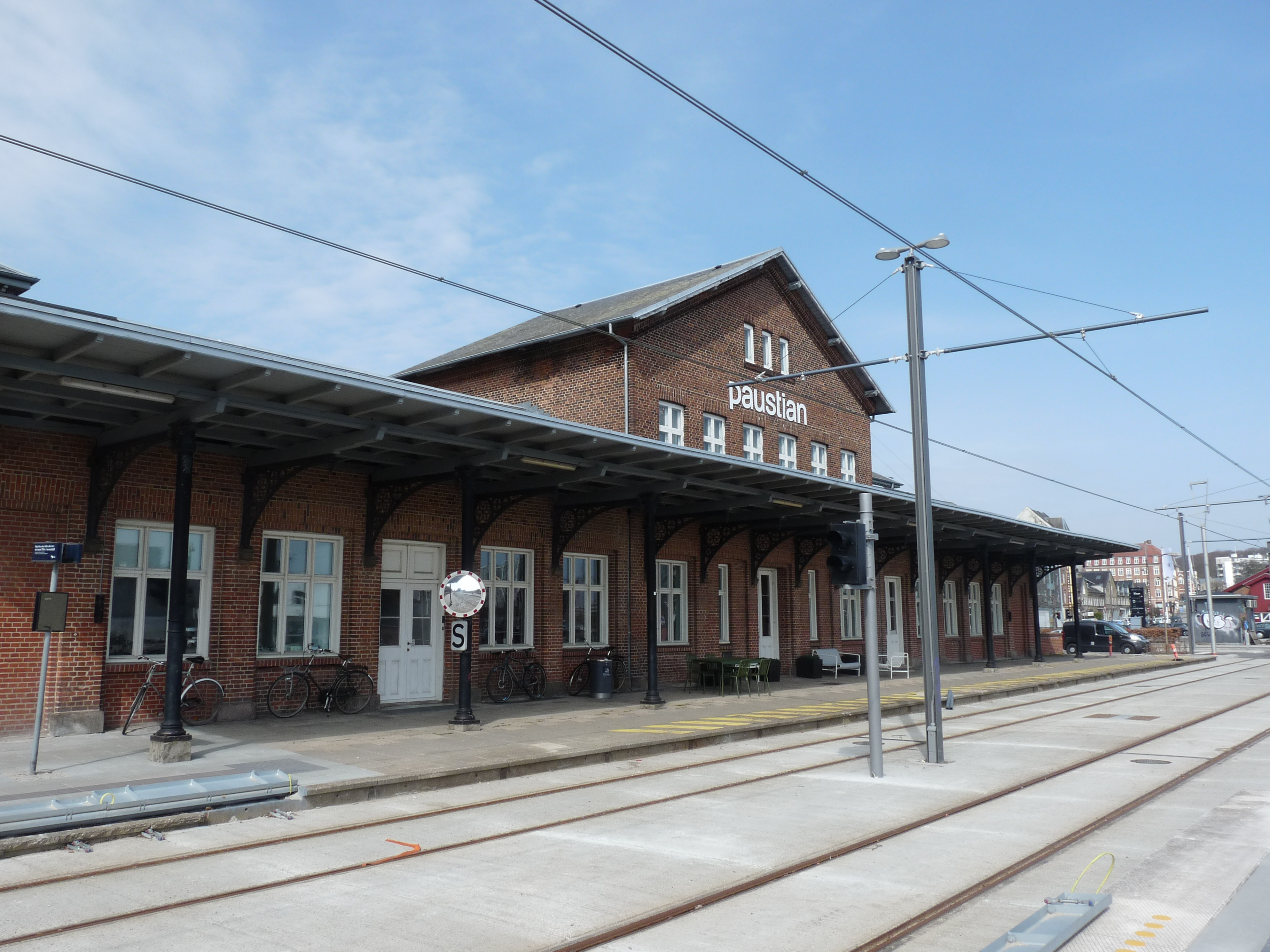 Traject Letbane L1 (Ostbanetorvet), voormalig station nu meubelzaak.